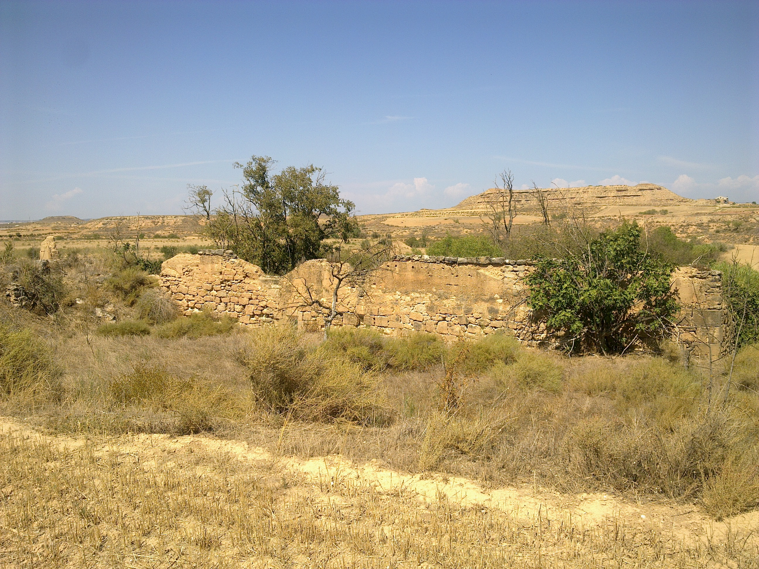 Obra popular Medieval